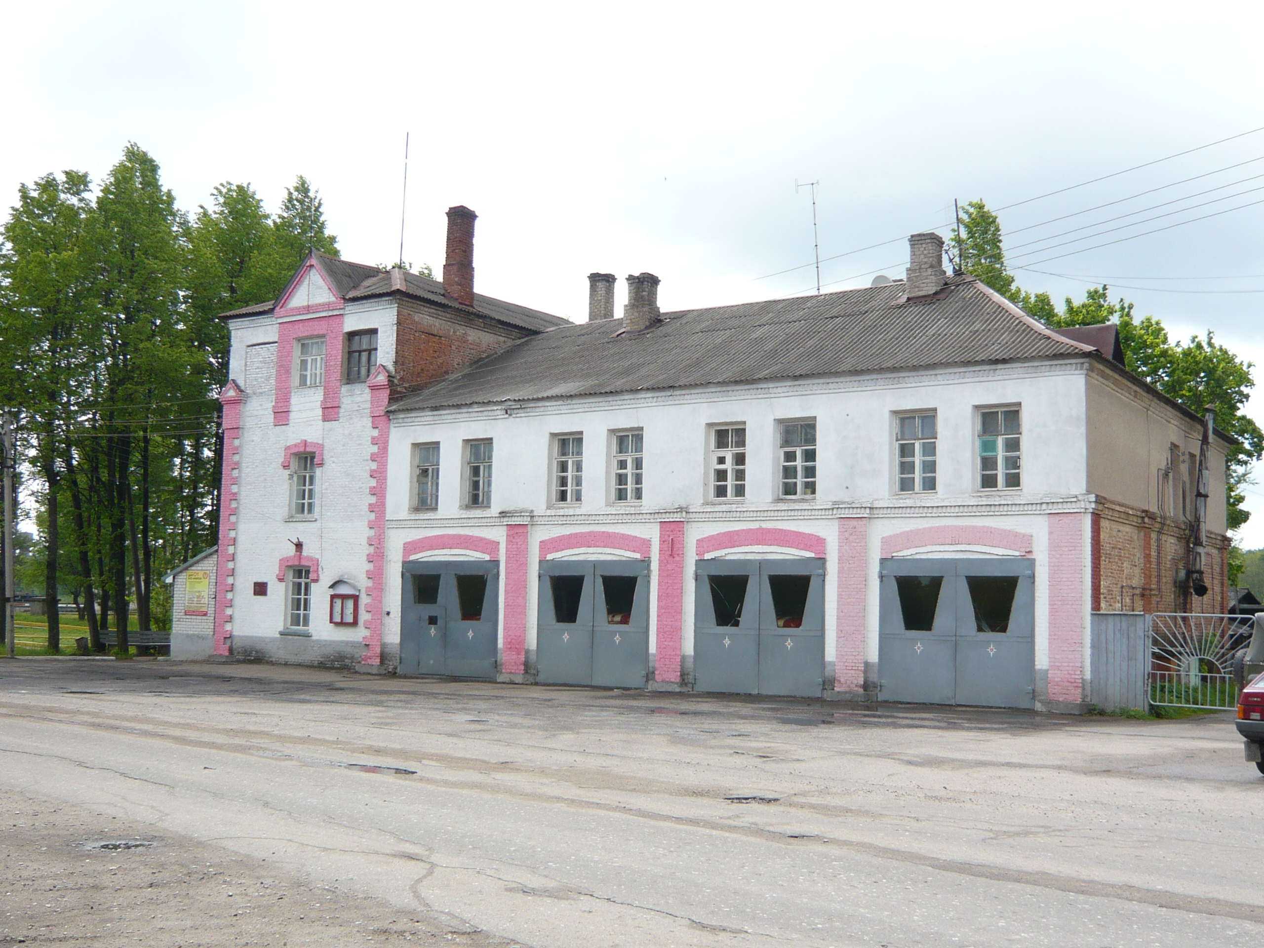 Пожарная часть города Кувшиново